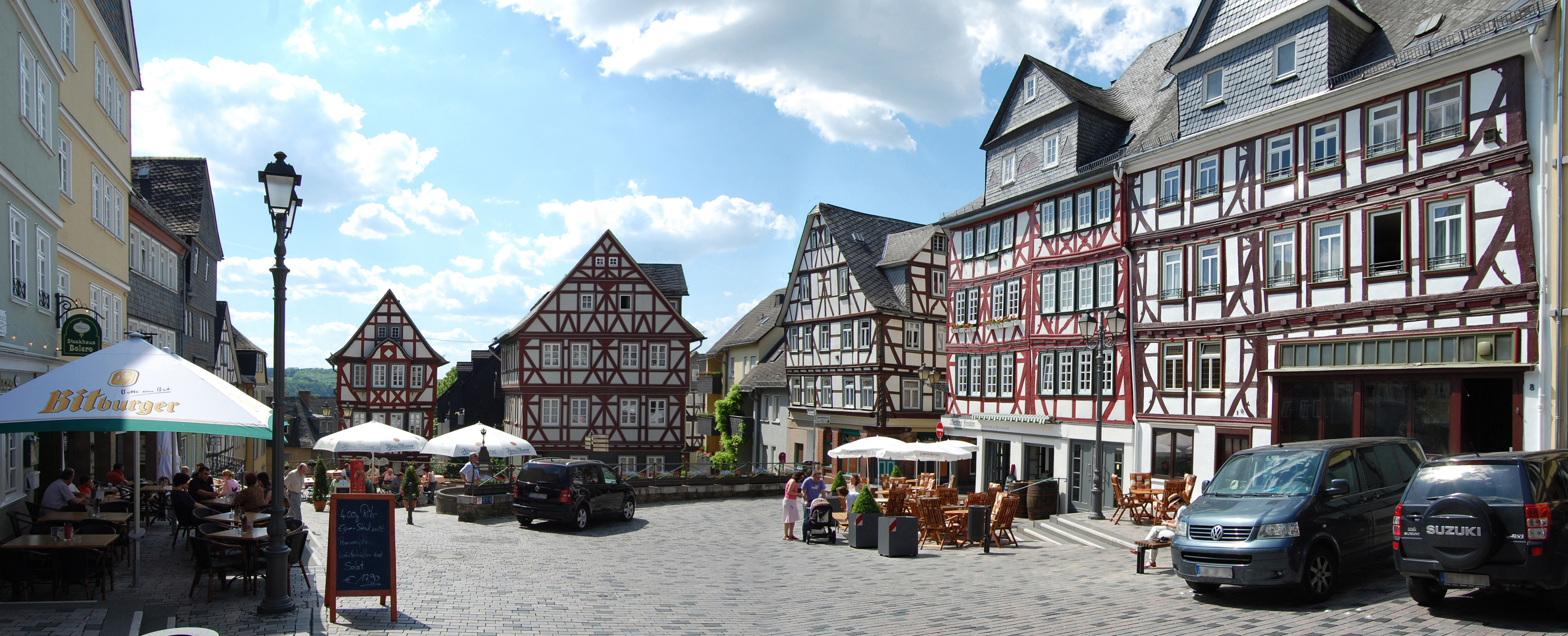 Der Kornmarkt in Wetzlar